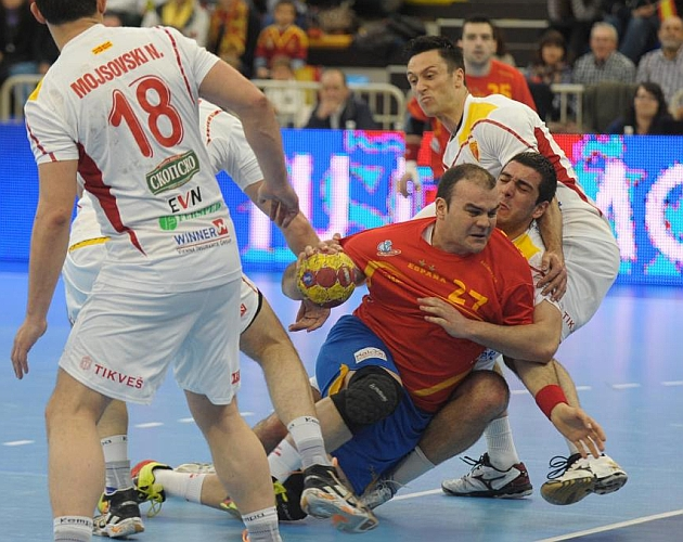 Rafa Baena jugador de balonmano